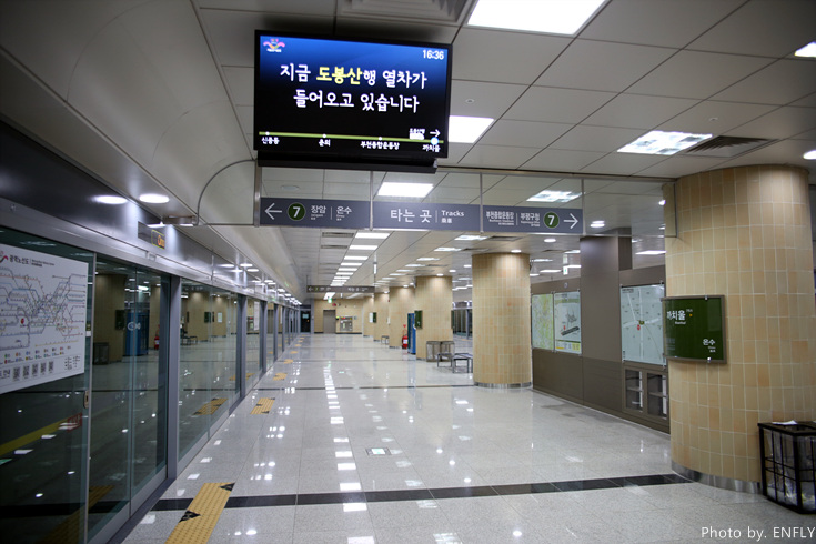 서울특별시 도시철도공사 7호선 까지울역 홈